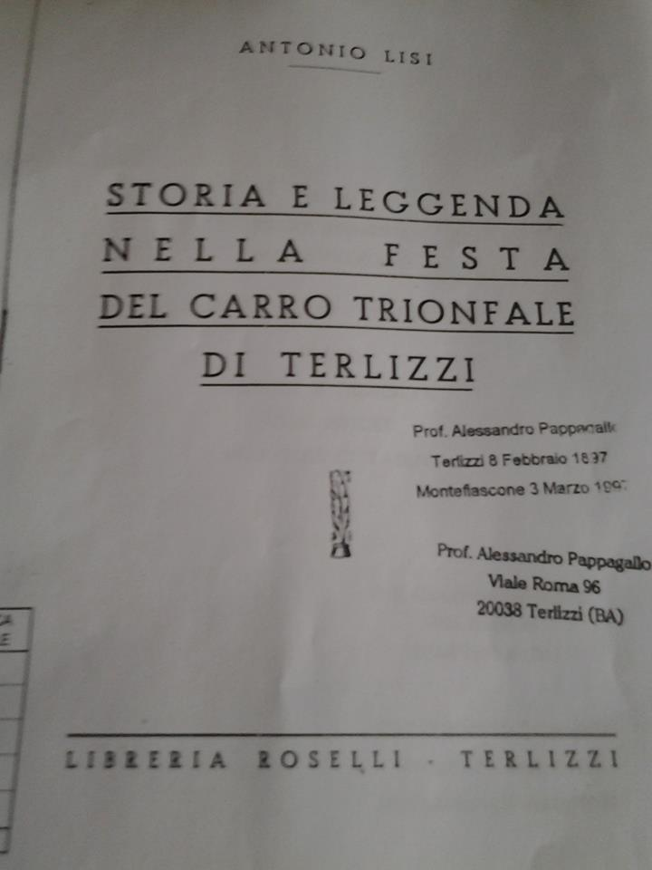 Rievocazione della Invenzione della Icona della Madonna di Sovereto